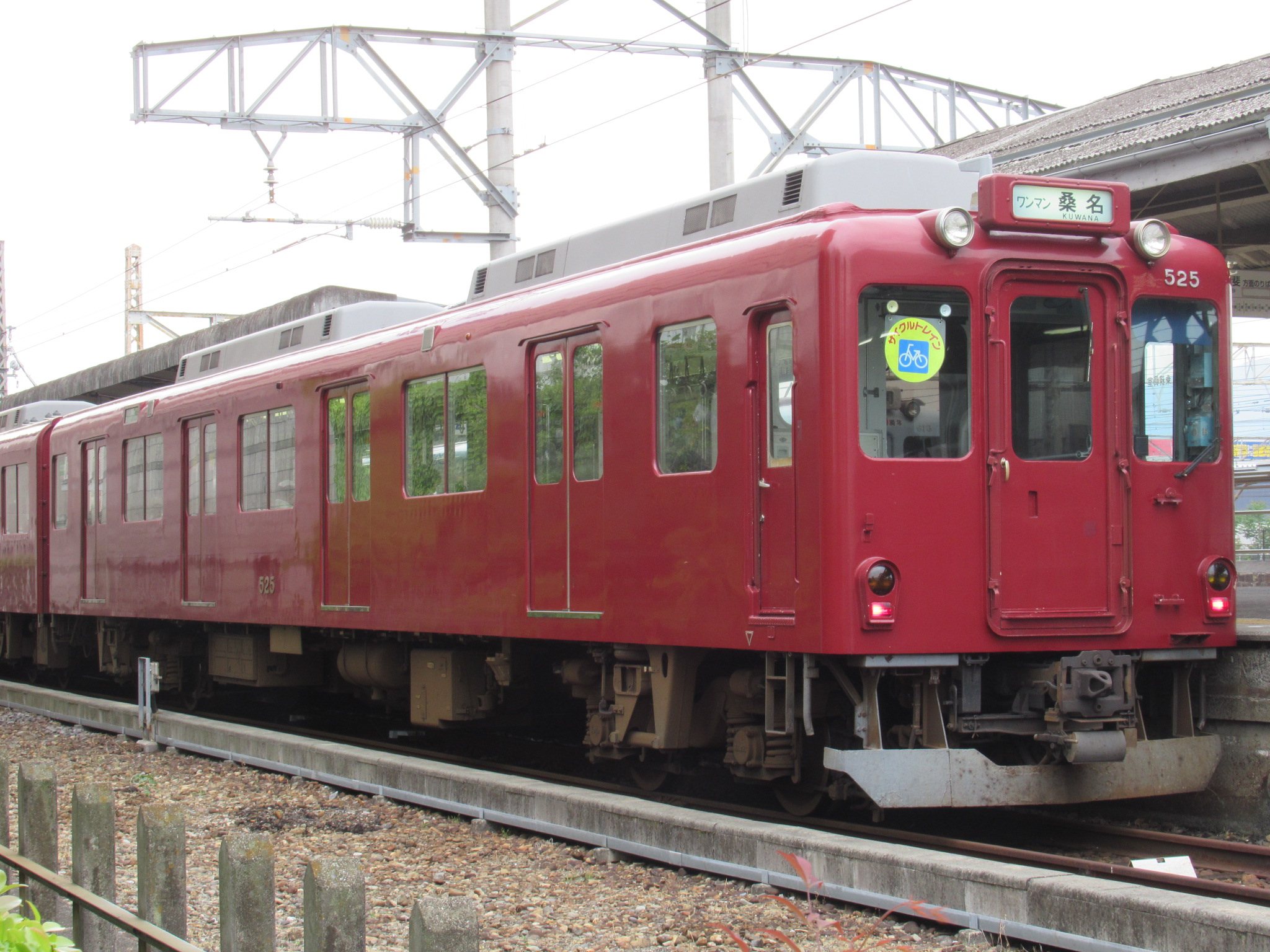 養老鉄道525 大垣駅